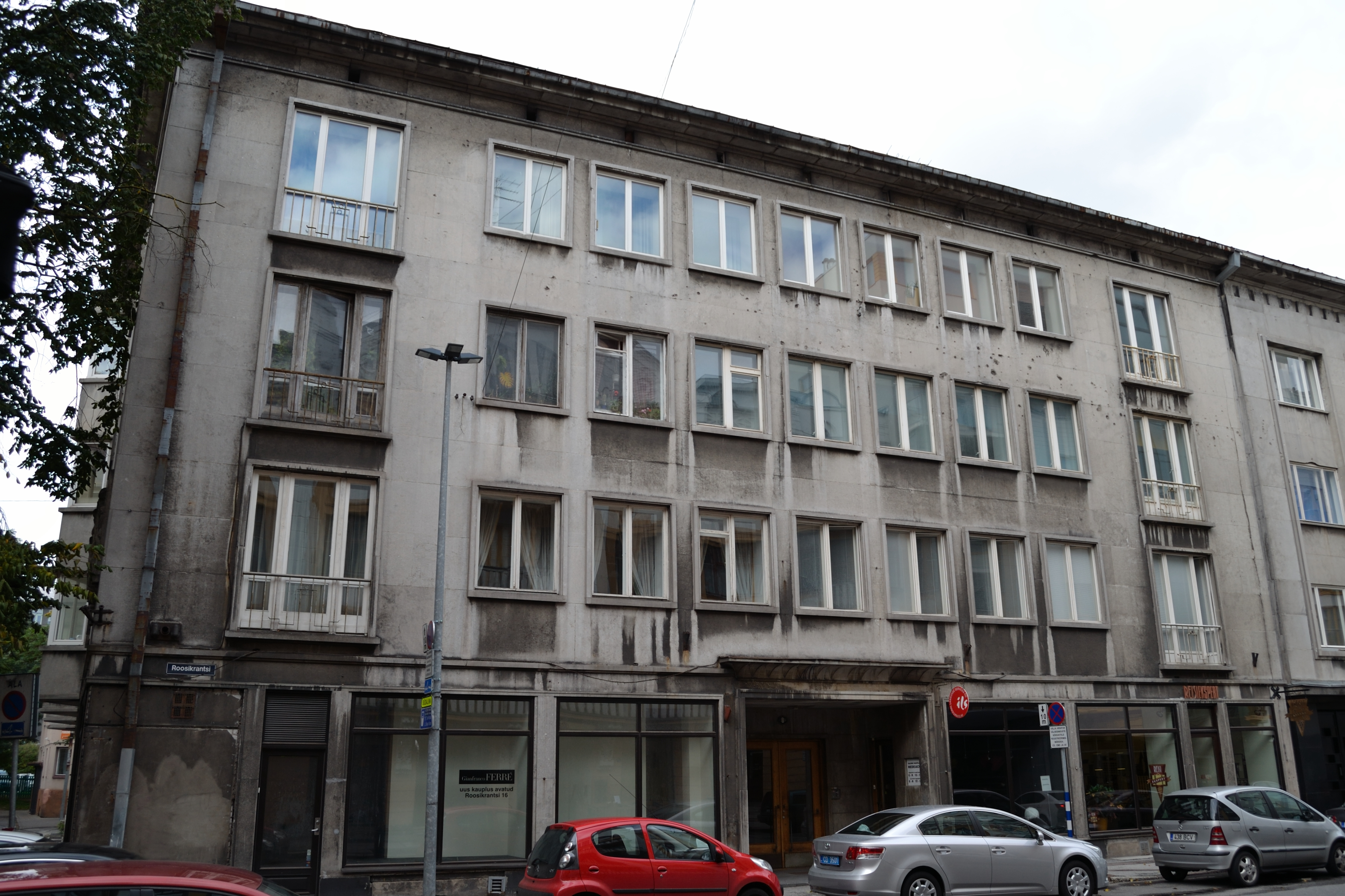 Tallinn, Roosikrantsi 8B